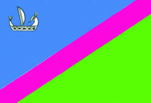 Прапор_Великоновоселківського_району